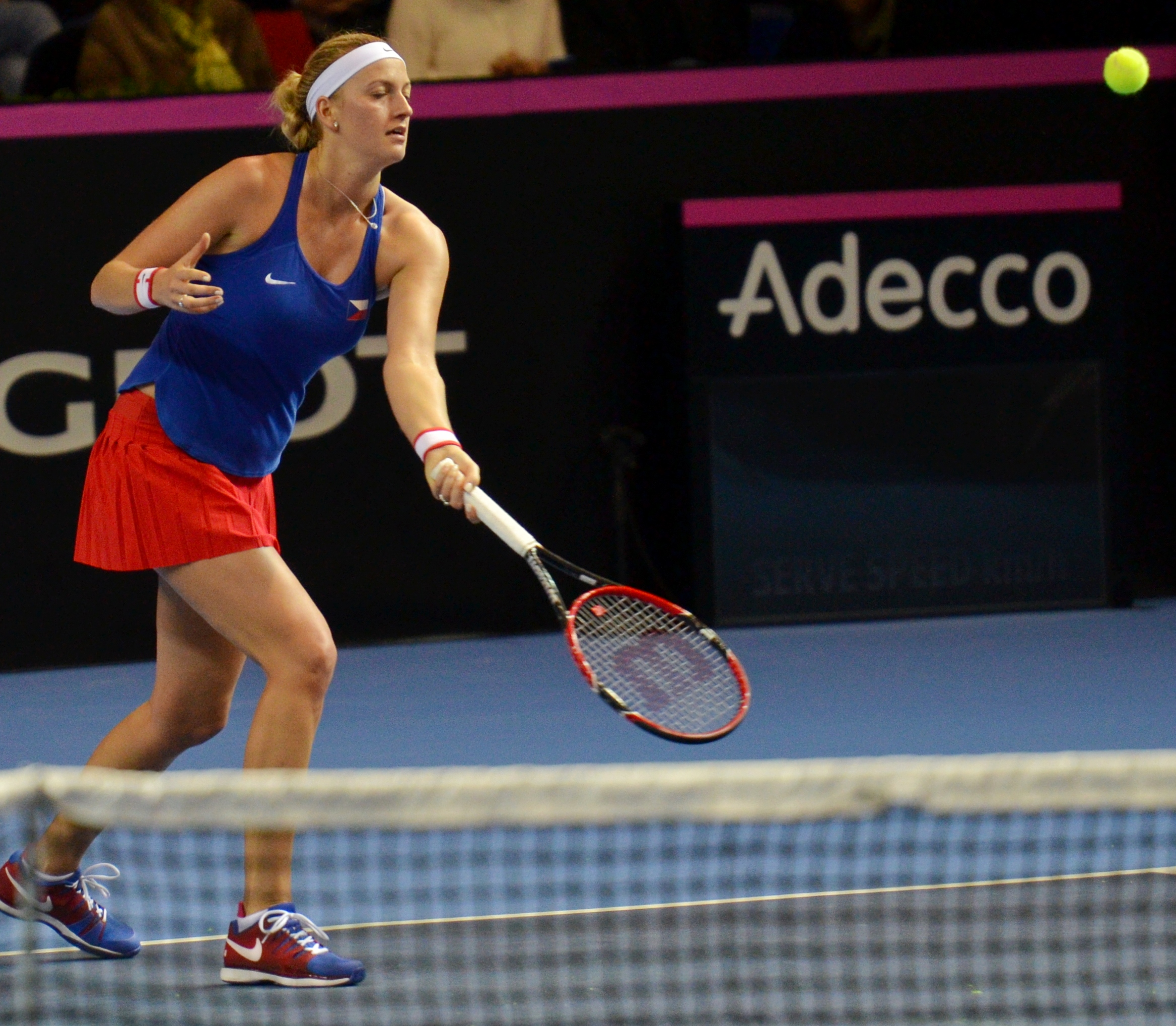 PPP_3138